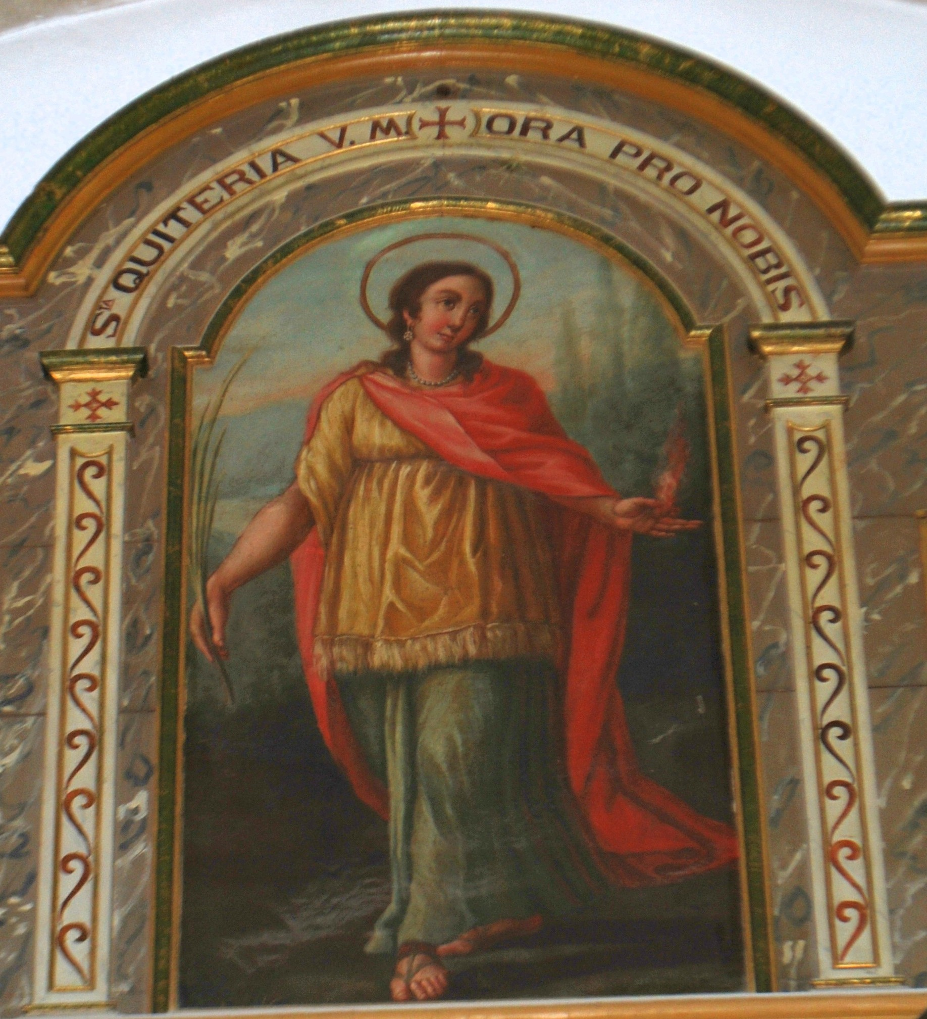 Pintura de santa Quitèria coronant un retaule, a una capella lateral de l'església de sant Antoniet a la ciutat de Mallorca